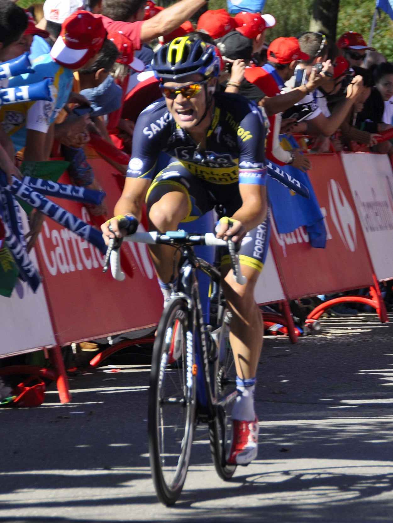 Nicolas Roche (Saxo Tinkoff) llegando 10º a la meta del Naranco